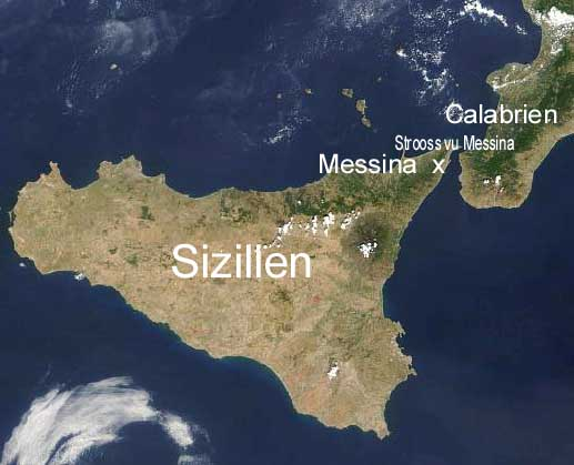 Satellintebild vu Sizilien